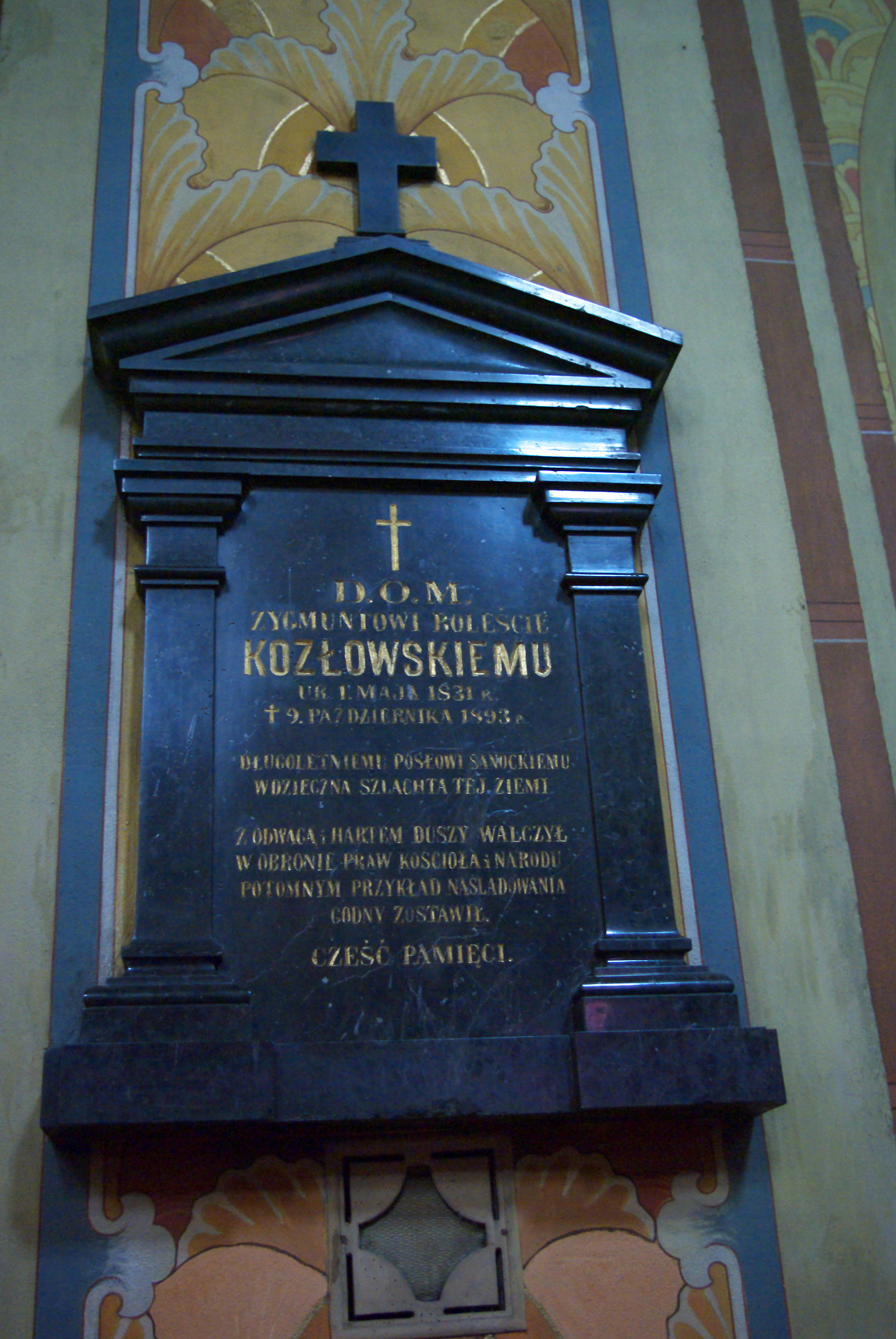 Epitafium Zygmunta Bolesty Kozłowskiego w kościele Przemienienia Pańskiego w Sanoku